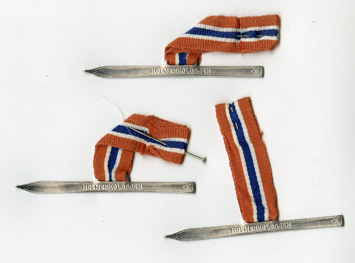 Format: Objekt, medaljer i aluminium Dato / Date: 6 Mars 1938 Sted / Place: Holmenkollen, Oslo Wikipedia: Holmenkollrennene Eier / Owner Institution: Trondheim byarkiv, The Municipal Archives of Trondheim Arkivreferanse / Archive reference: Ranheim Papirfabrikk: Saksarkiv - Scankraftmøte 1938 - Memoarer (1938 - 1940) Merknad: De svenske, norske og finske kraftpapirfabrikanters noteringsforening Scankraft avholdt sitt ordinære kvartalsmøte i Oslo 4 - 7 mars 1938. Som en del av programmet for Scankraftmøtet dro deltagerne med fruer for å se sine landsmenn konkurrere i hoppløp og 50-kilometer ved Holmenkollrennene.